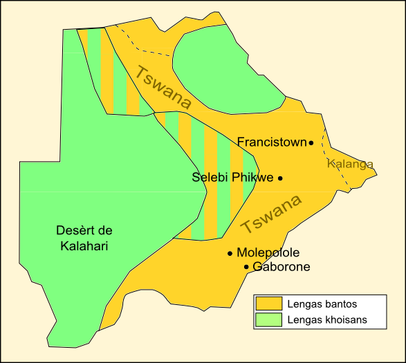 Esquèma generau dei lengas de Botswana.